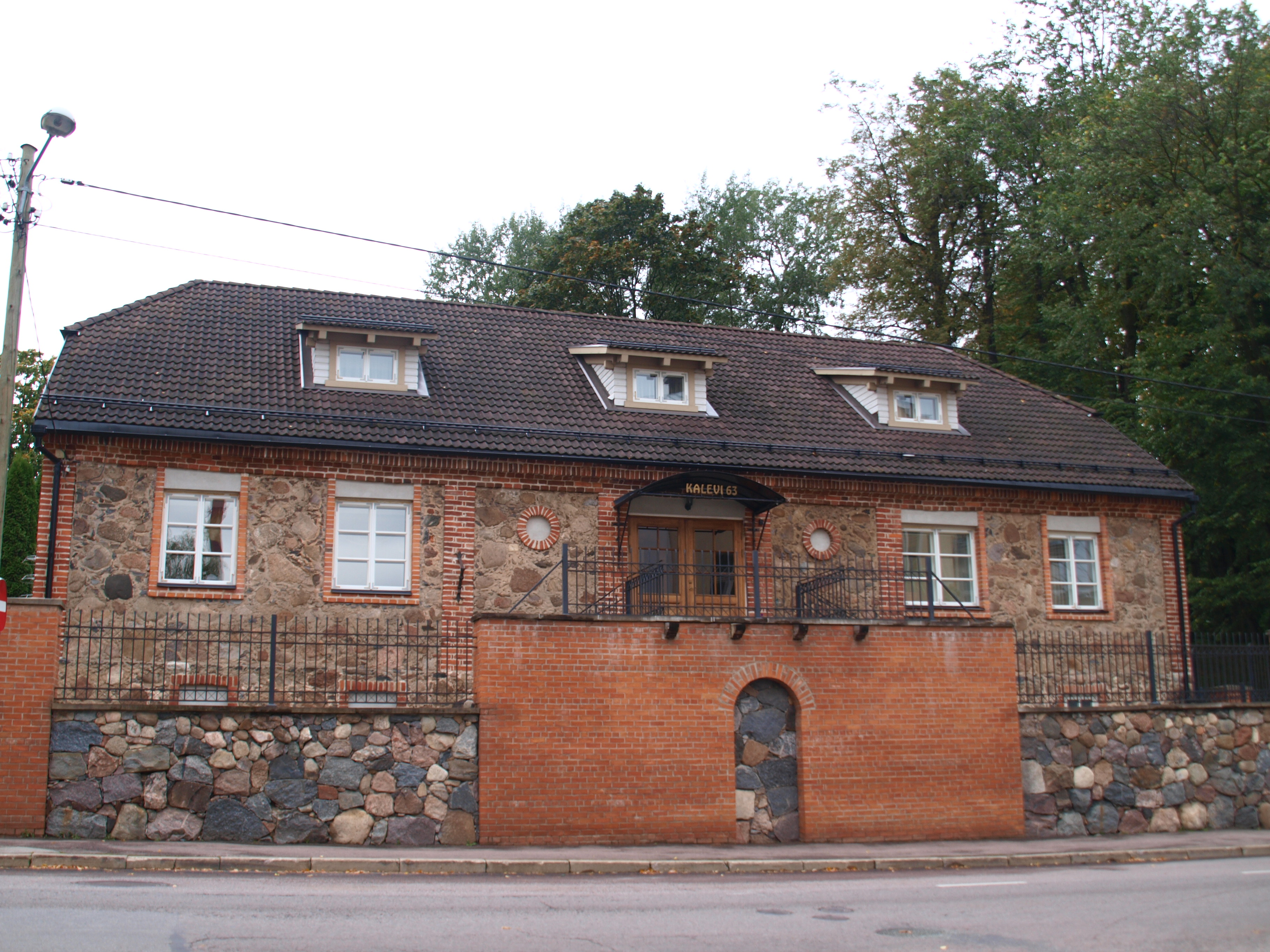 Karlova mõisa ait, 19.saj. Kalevi 63